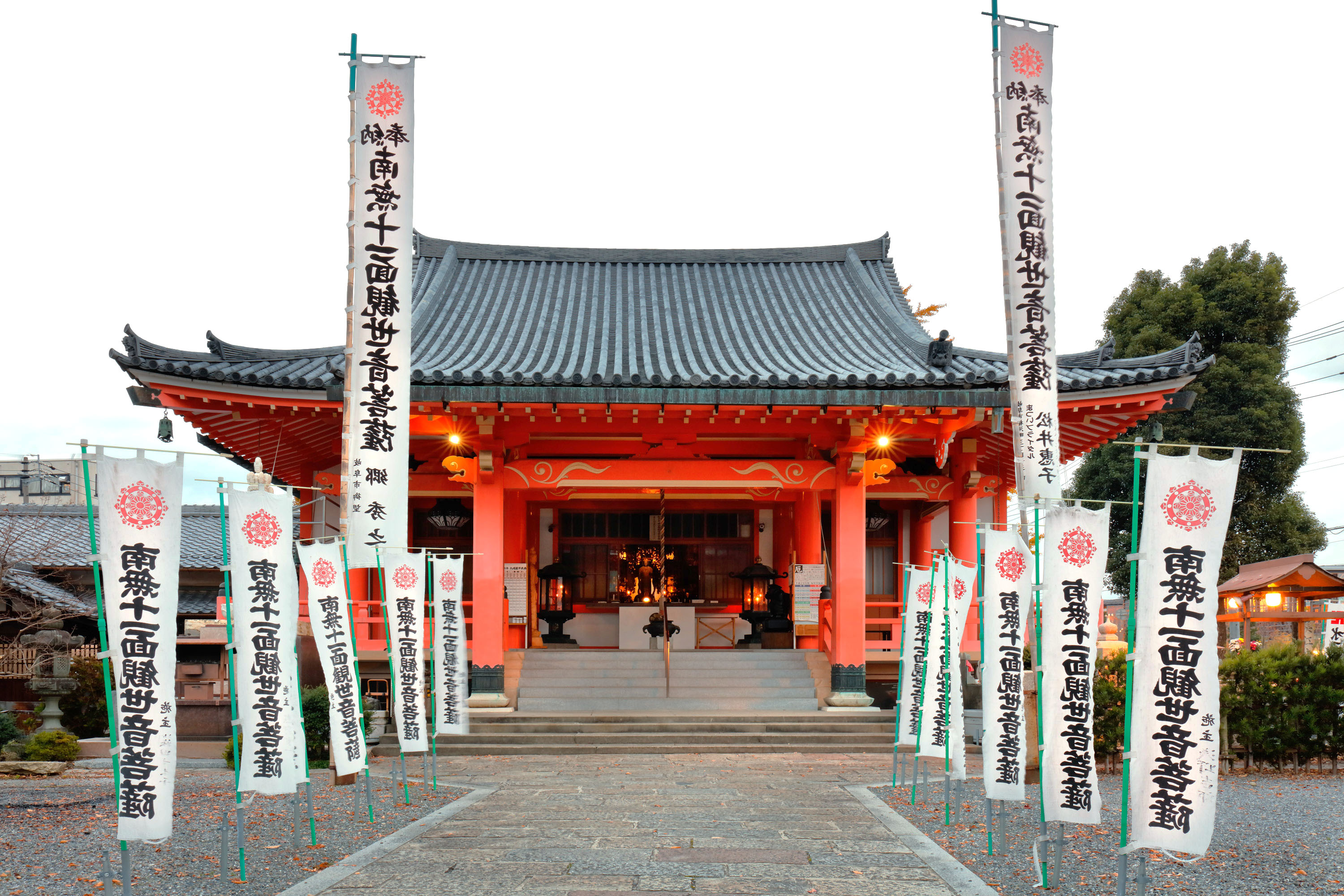 美江寺 (岐阜市)-本堂